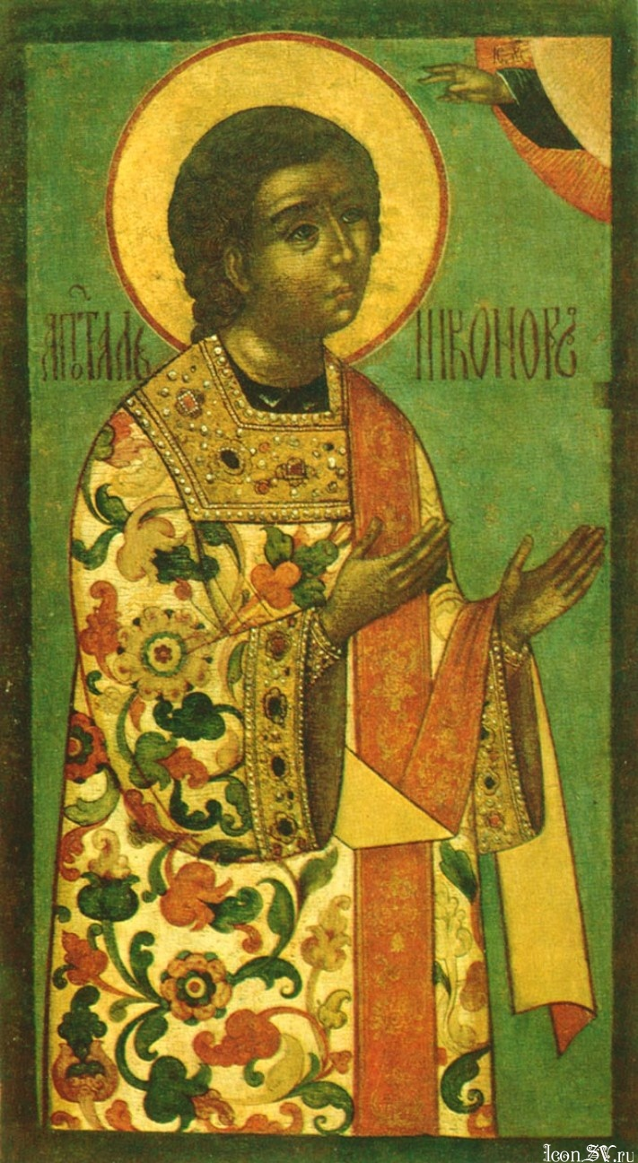 Апостол Никанор Москва, 1685 г. Смоленский собор Новодевичего монастыря. Иконописец Федор Зубов.